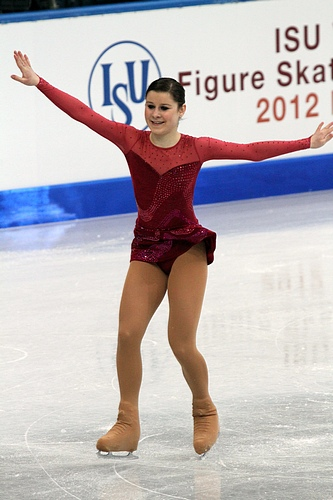 Забрина Шульц (Австрия) на чемпионате мира по фигурному катанию среди юниоров 2012